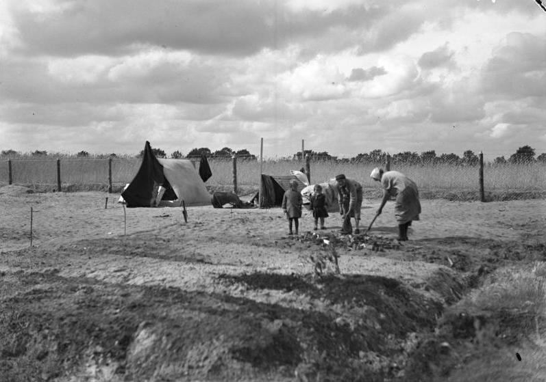 Berlin Stadtrandsiedlung Siedler bei der Feldarbeit